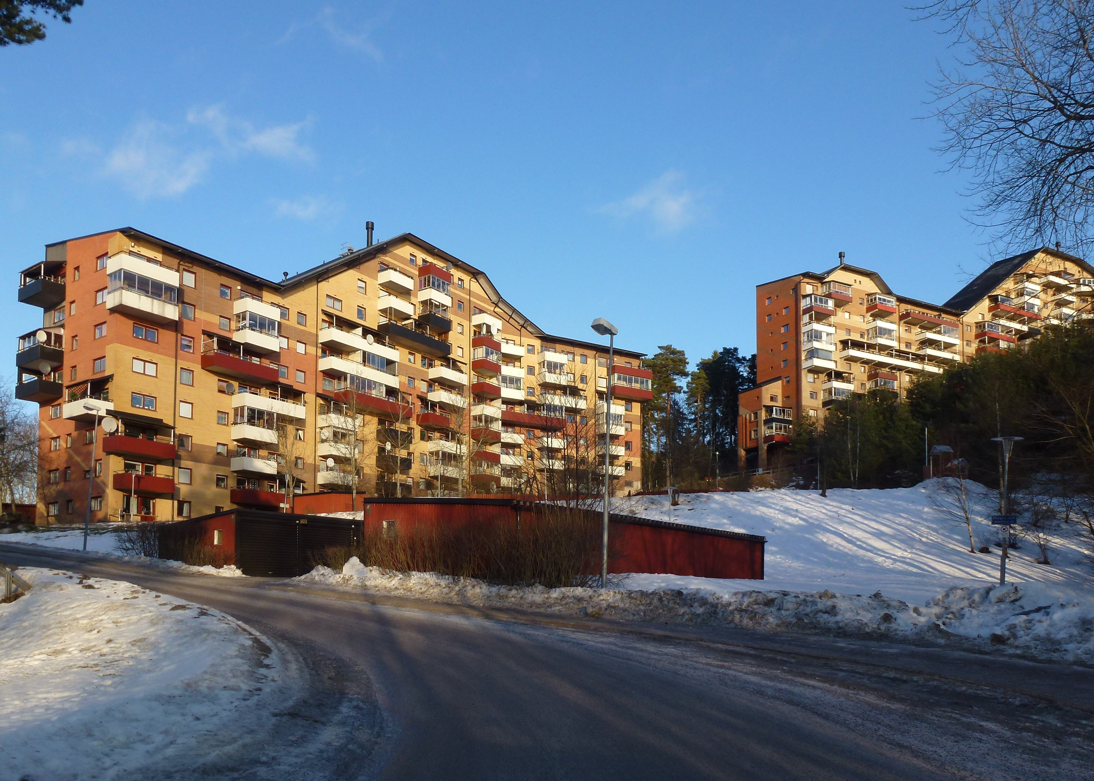 Myrstuguberget